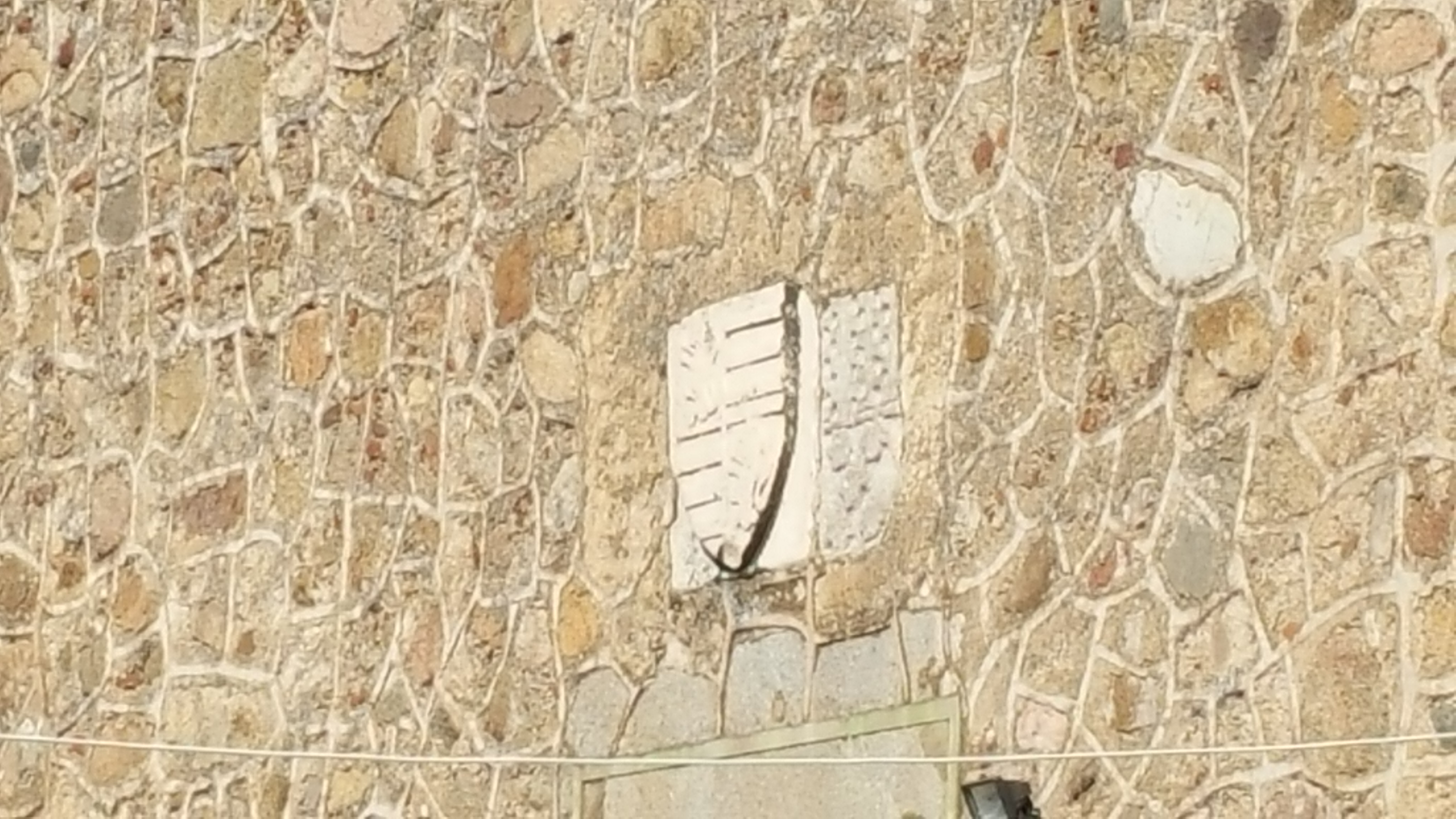 Exteriores del Castillo de los Arcos. Almendral, Badajoz.